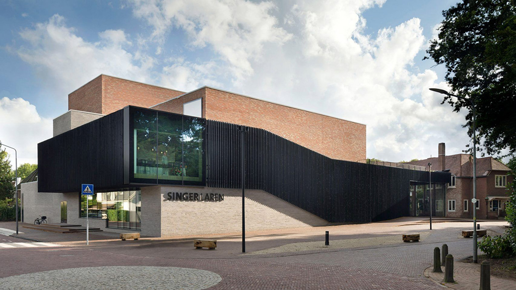 In september 2017 opende Singer Laren een nieuw theater en een centrale entree die het museum, theater en de beeldentuin met elkaar verbindt.